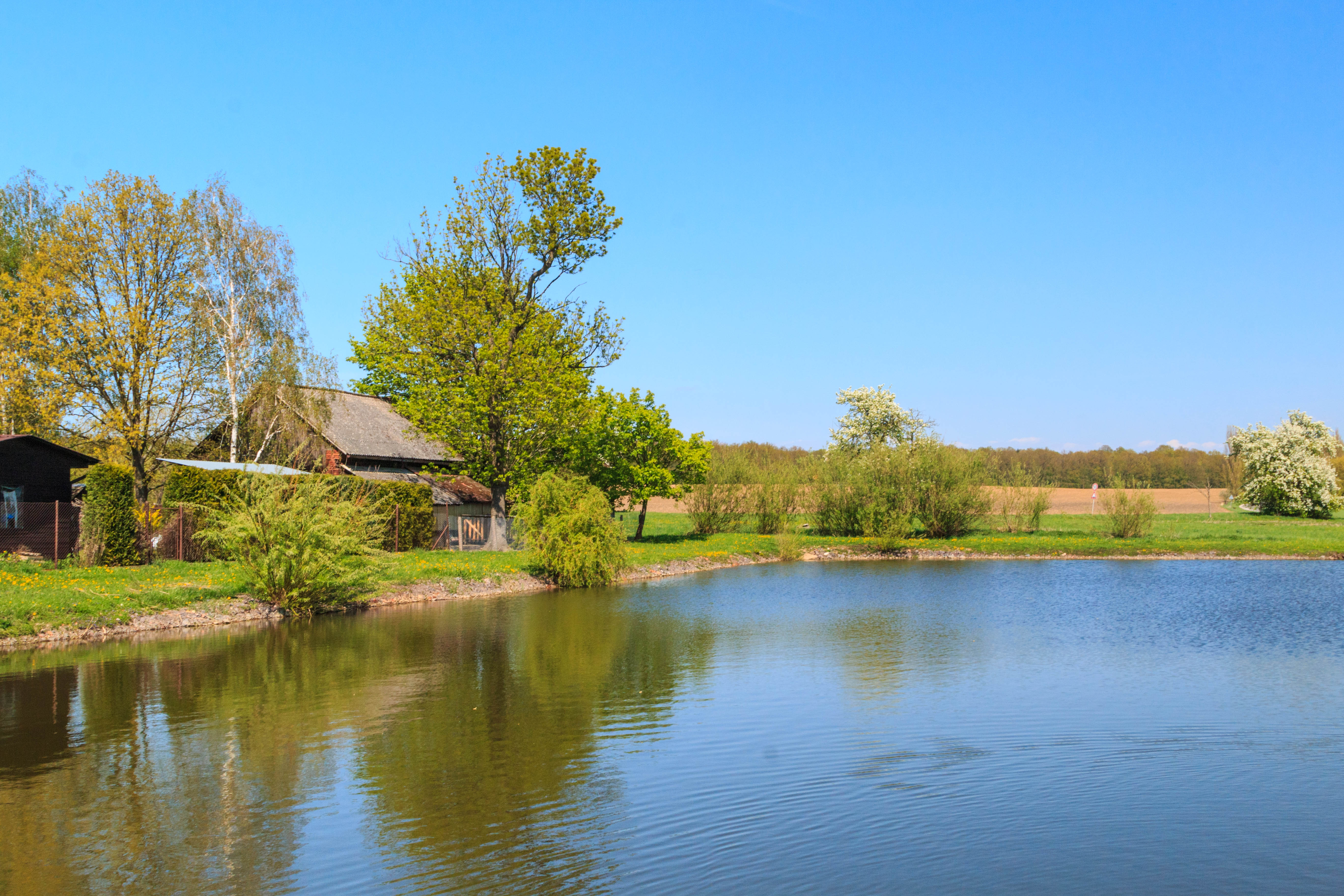 Podolibský rybník Project: Vodstvo